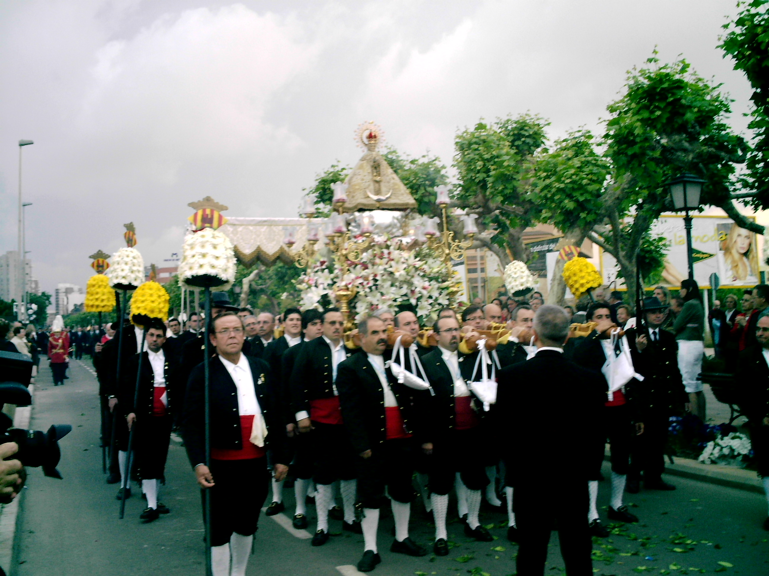 Imagen de la Patrona de Castellón de la Plana durante una procesión.